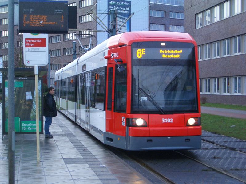 Triebwagen 3102 (Typ: GT8N-1; Hersteller: Bombardier; Baujahr: 2005) der Bremer Straßenbahn AG an der Haltestelle "Neuenlander Kämpe" in Bremen